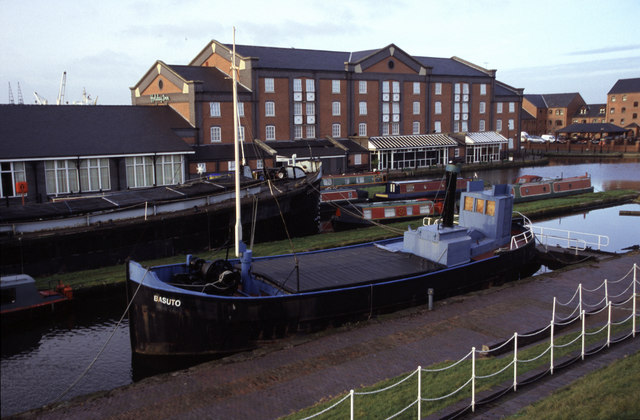 Basuto (Clyde puffer), Ellesmere Port.